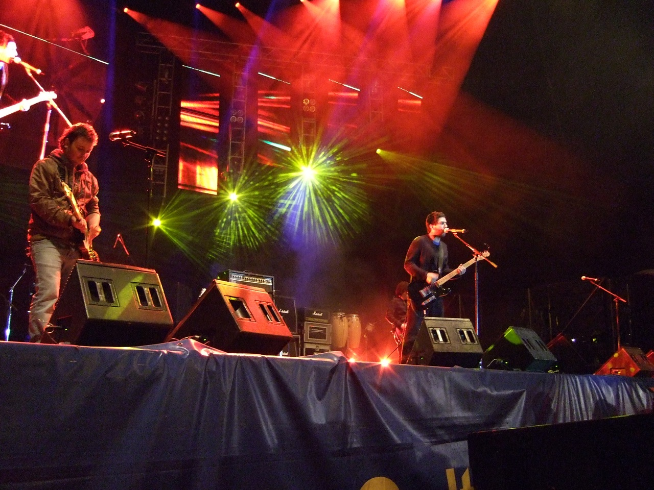 El grupo de rock Bajo Tierra en el Festival Rock al Parque (Bogotá, Colombia, 2007)